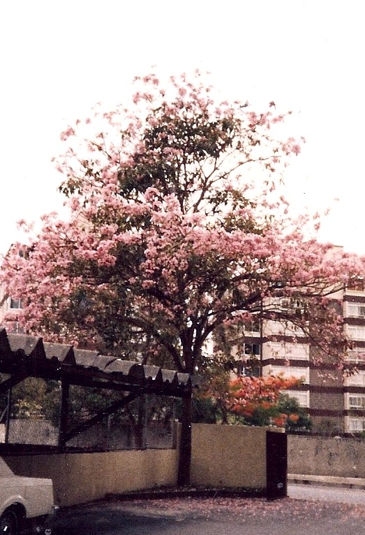 Apamate (Tabebuia rosea) en la urbanización Los Pinos, Municipio El Hatillo. estado Miranda - Venezuela 1980